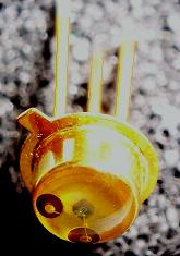 Fototransistor (Total zu fototransb.jpg) andere Versionen: fototransb.jpg (Makroaufnahme Innenleben)